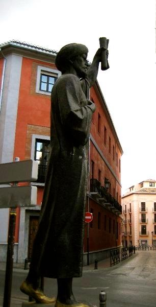 En la entrada del Realejo, en la calle Pavaneras, esta la escultura de Yehuda Ibn Tibón, una de las figuras más señaladas del judaísmo español. Nacido en Granada en 1120, fue médico, filósofo y lingüista, pero sobre todo, ha pasado a la historia como el «padre de los traductores». Gracias a las traducciones de los textos árabes al hebreo fue accesible a la Europa medieval la ciencia árabe, y a través de ella los textos griegos. Aunque Ibn Tibón tuvo que abandonar Granada, ante la presión almohade en 1148 a los 28 años.